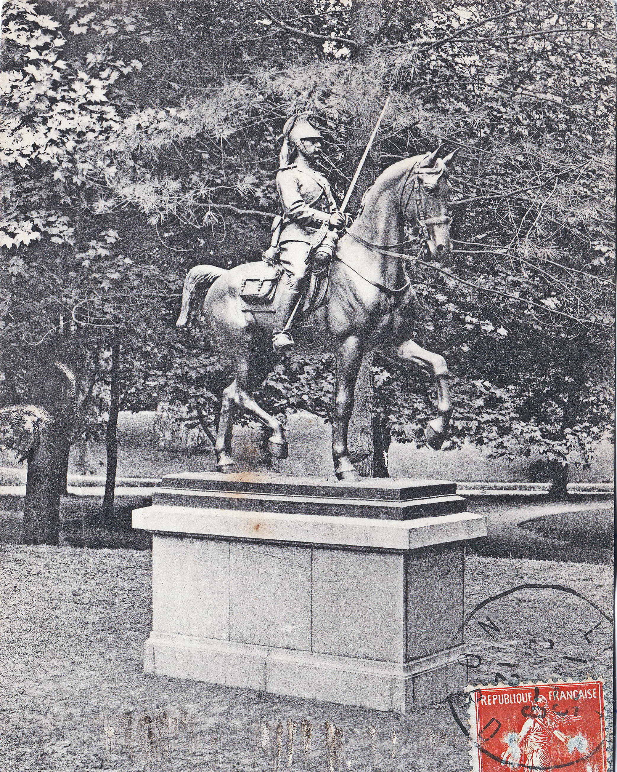 Lille (France - département du Nord) — Statue Équestre de Jean Joire dénommée "En Vedette", qu'il offrit à la Ville de Lille. La statue se trouvait au bois de Boulogne de Lille. Retirée en raison d'actes de vandalisme, elle est déplacée, et non sans être restaurée, installée dans l'enceinte du Cercle Frère [mess] de la Base de Défense de Lille, cachée du lambda par une haie boisée, rue des Bâteliers. Le site suivant indique l'année 1913 comme date de la création de l'oeuvre ; la carte postale a été envoyée en août 1912. →*